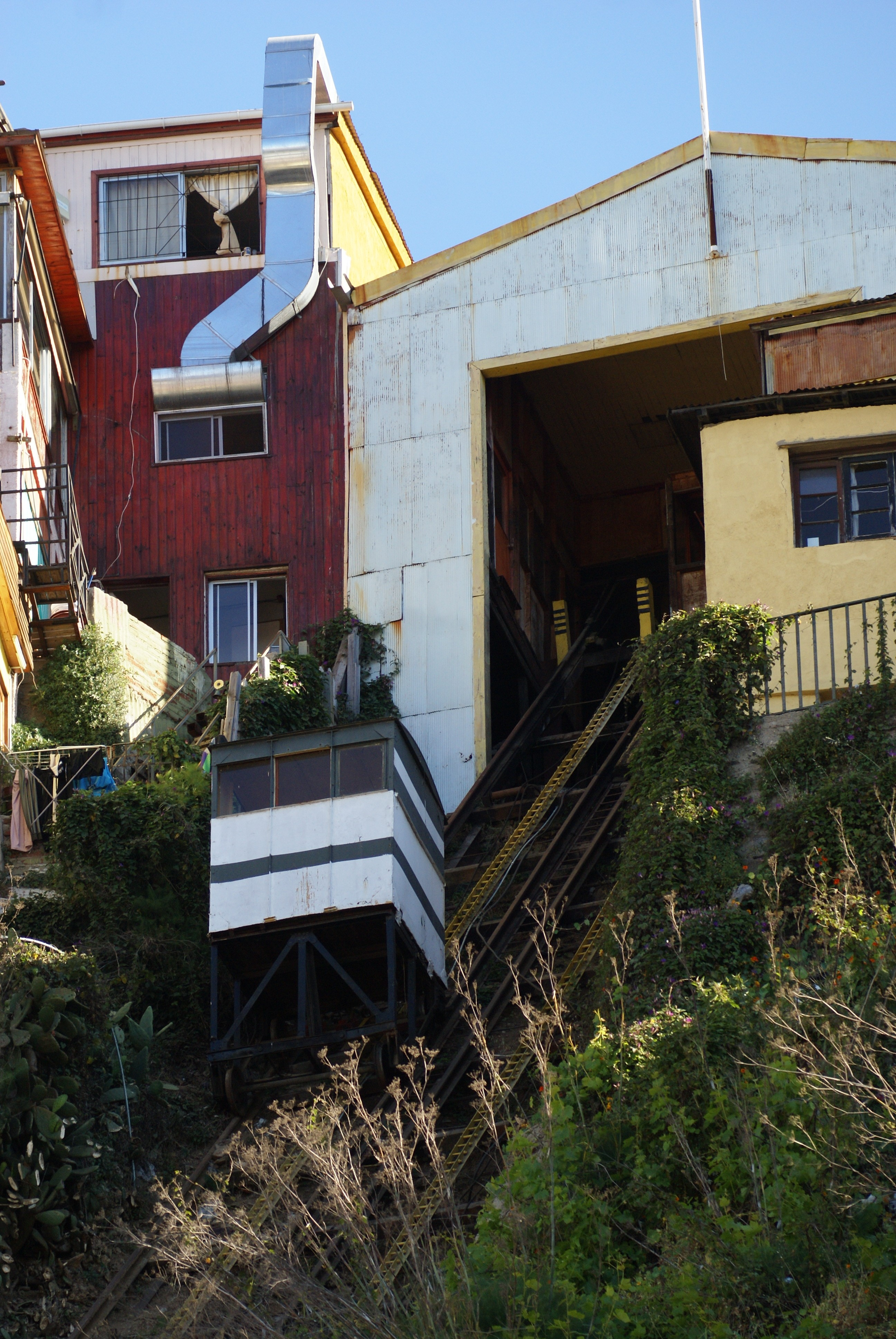 Ascensor Espíritu Santo This is a photo of a national monument in Chile: 777